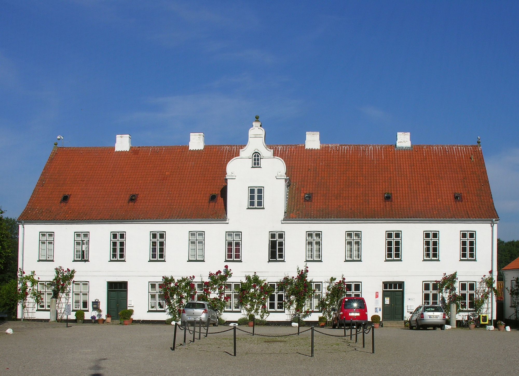 Kulturdenkmal 4.7 Kavalierhaus am Wirtschaftshof von Schloss Glücksburg in Schleswig-Holstein Foto 2012 Wolfgang Pehlemann Steinberg/Ostsee DSCN0210